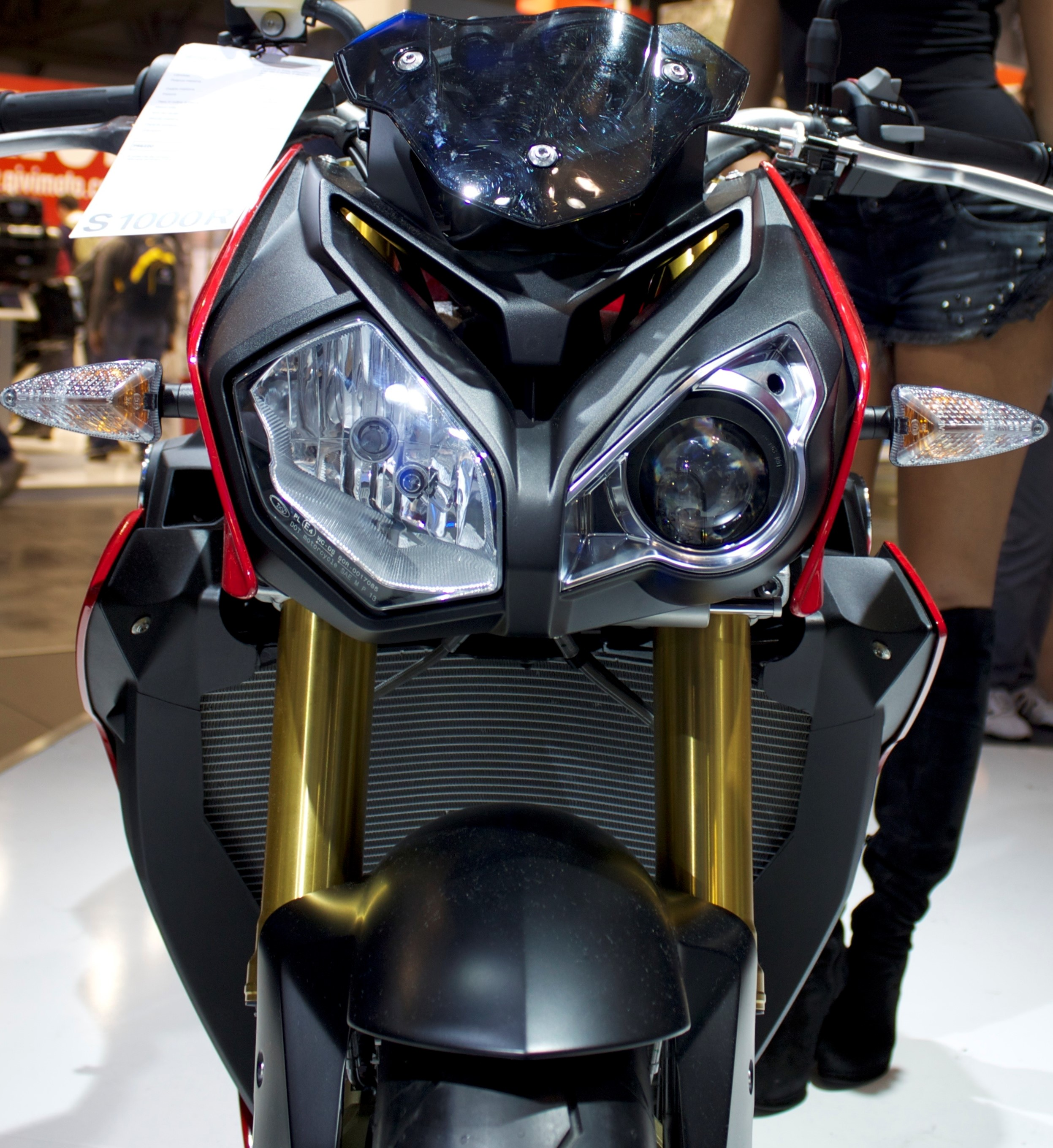 BMW S 1000 R